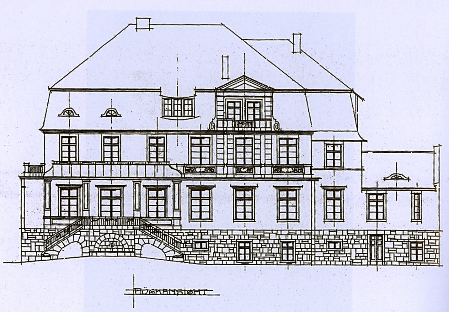 Villa